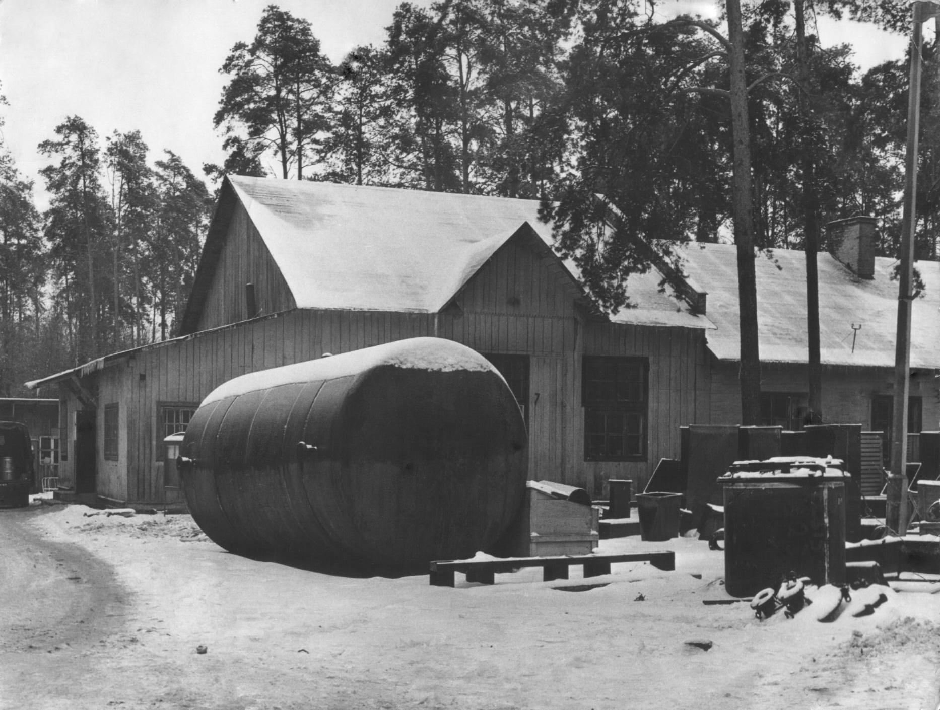 Pierwsza siedziba kierownictwa Przedsiębiorstwa Montażowego „Montoerg”. Następnie w baraku miał swoją siedzibę Dział gospodarczy Przedsiębiorstwa Remontowo-Montażowego „Ogranika” i Przedsiębiorstwa Robót Montażowych „Chemomontaż”